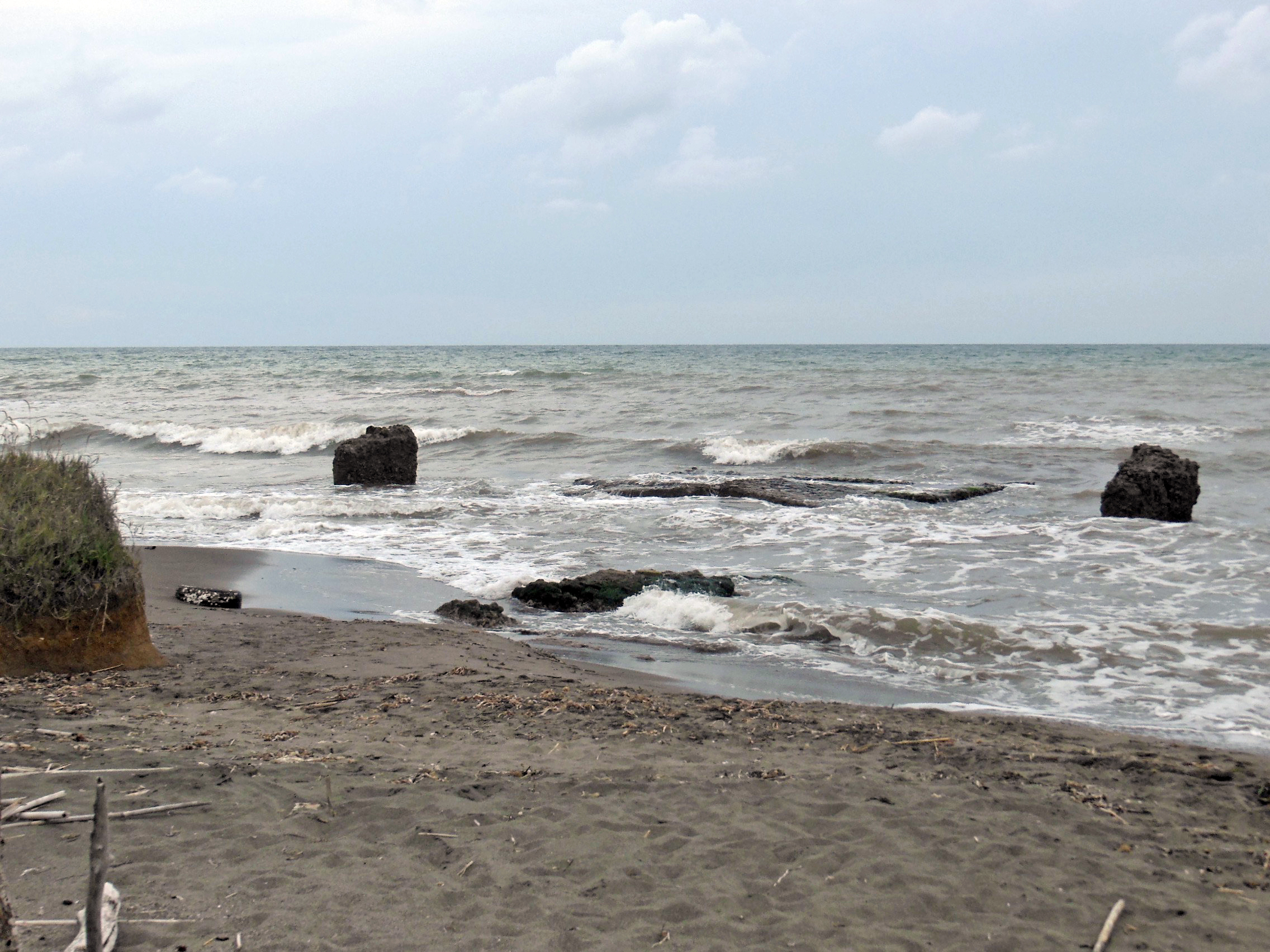 Martanum (comune di Tarquinia, spiaggia tra Marina Velca e Pian di Spille), gruppo settentrionale di ruderi (peschiera), vista di insieme